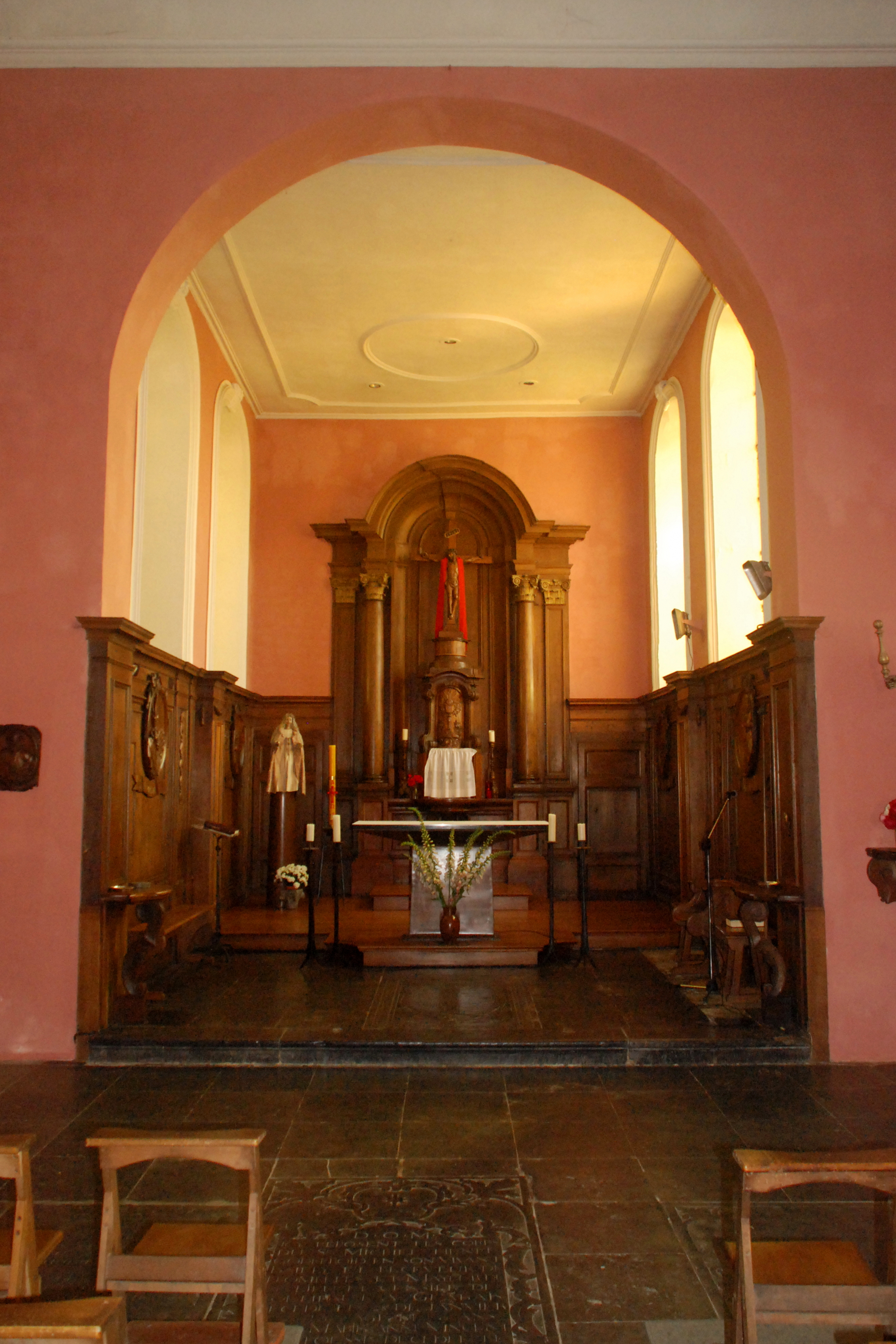 Belgique - Brabant wallon - Genappe - Glabais - Église Saint-Pierre